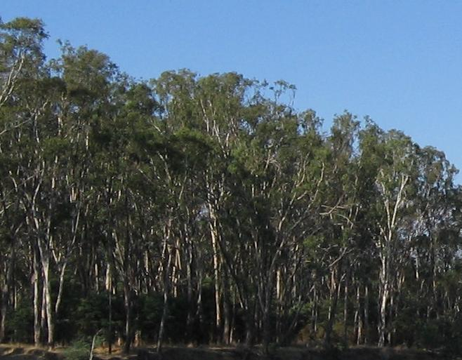 Mallee